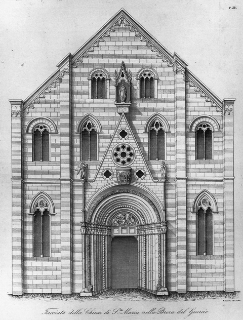 La facciata della demolita (1808-1809) chiesa di Santa Maria in Brera, a Milano.